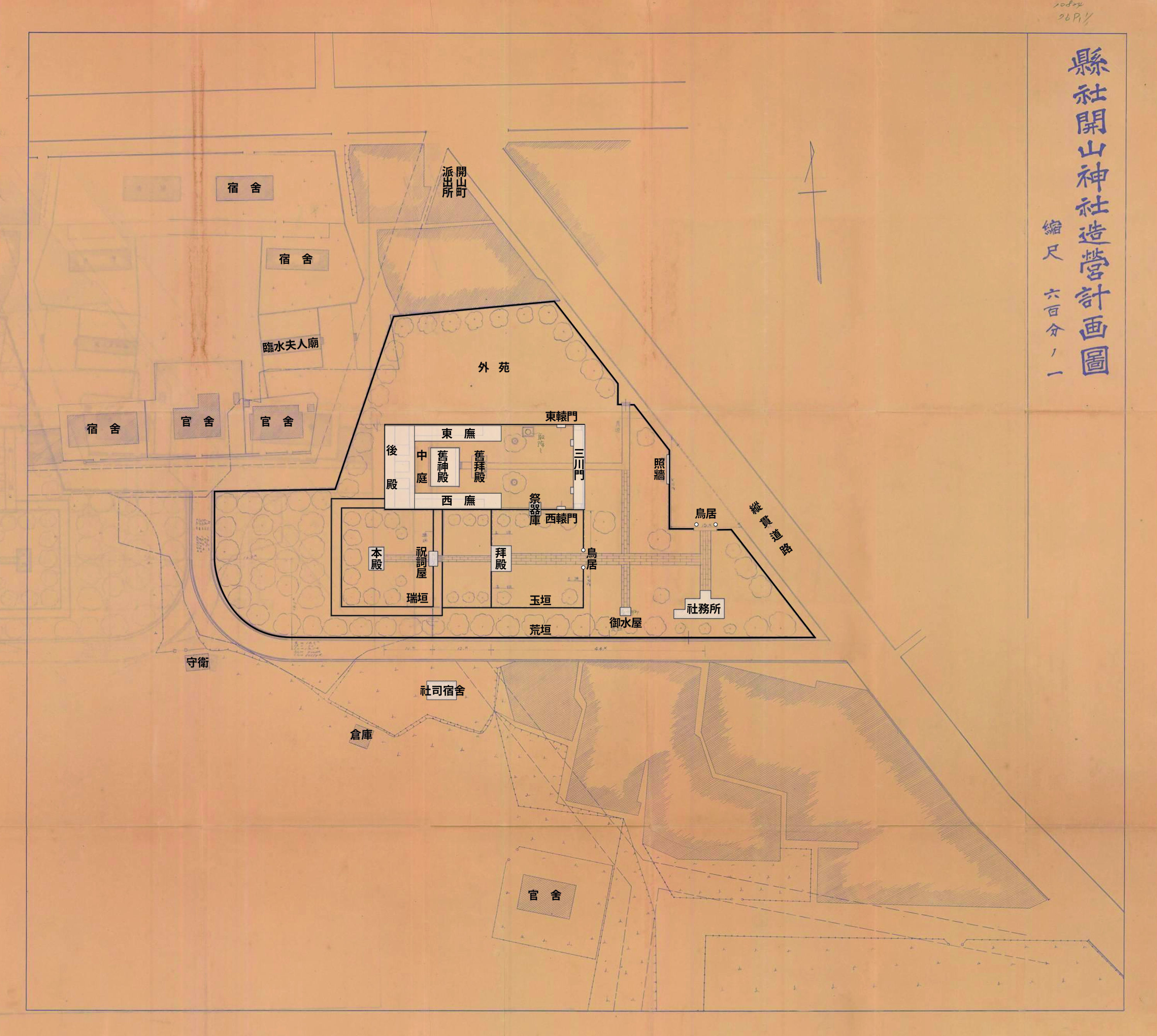 中文（台灣）: 位於台灣臺南市的縣社開山神社，其擴建計畫始自1937年，於1939年動工，1941年竣工。此次擴建於原延平郡王祠南側新建了內地式的神社設施，並將神社神苑擴大。